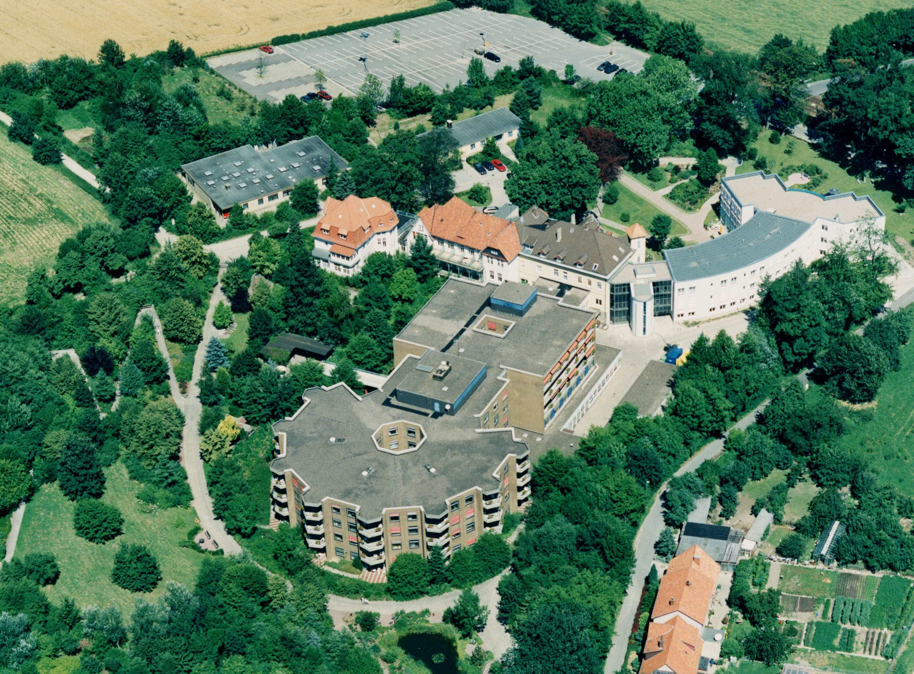 Luftbild Krankenhaus Lindenbrunn aus dem Jahr 1996